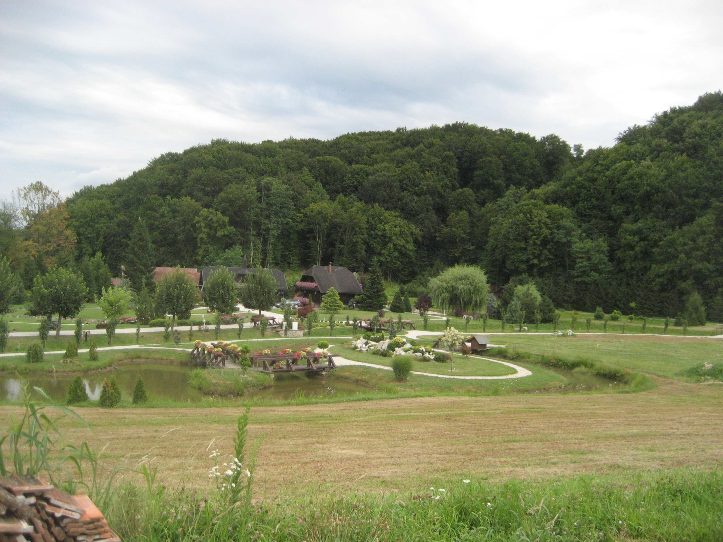 Bozicna Prica, Grabovnica